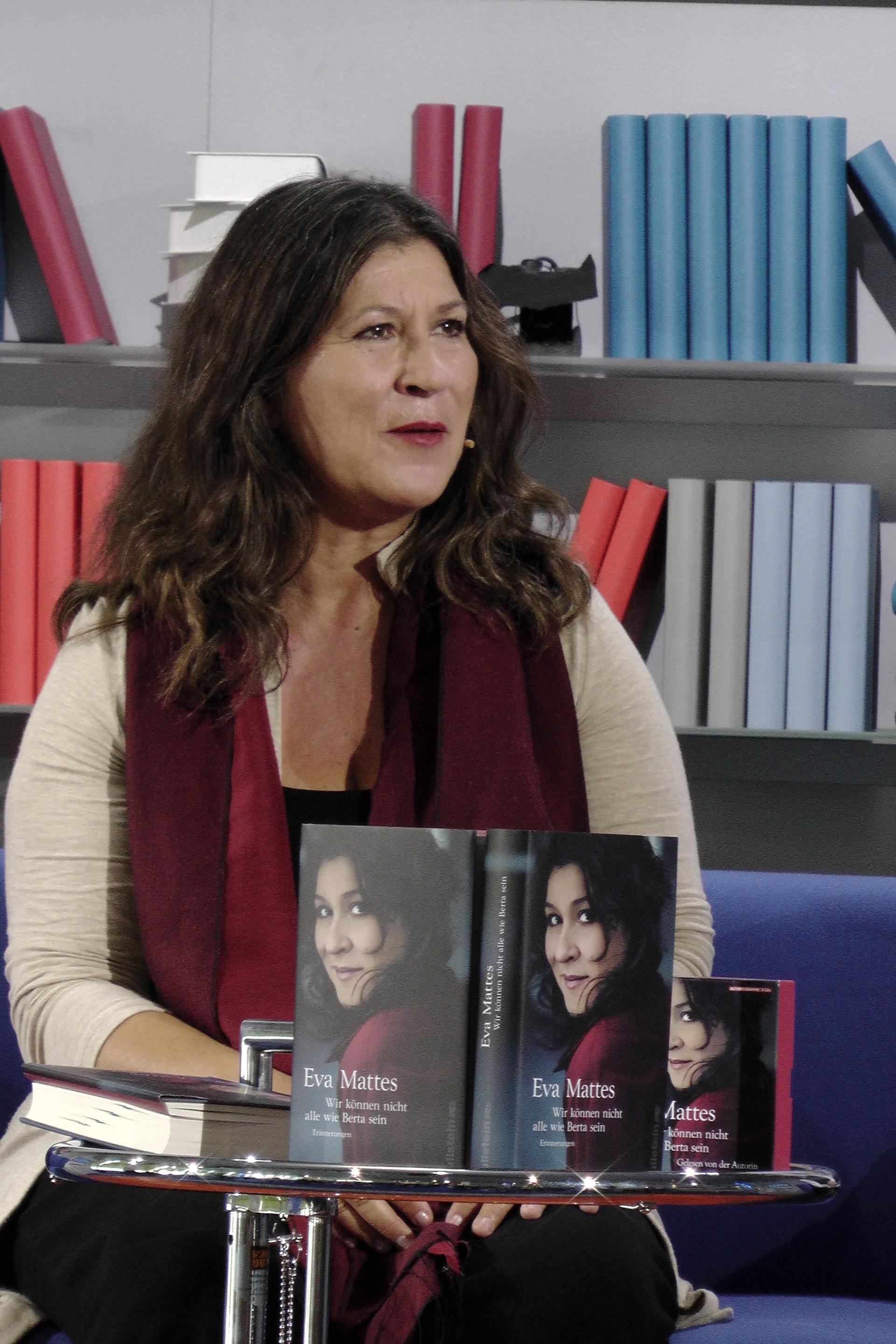 Eva Mattes. Dieses Fotos dürfen Sie honorarfrei nutzen, wenn Sie folgenden credit beachten: Copyright: Das blaue Sofa / Club Bertelsmann.